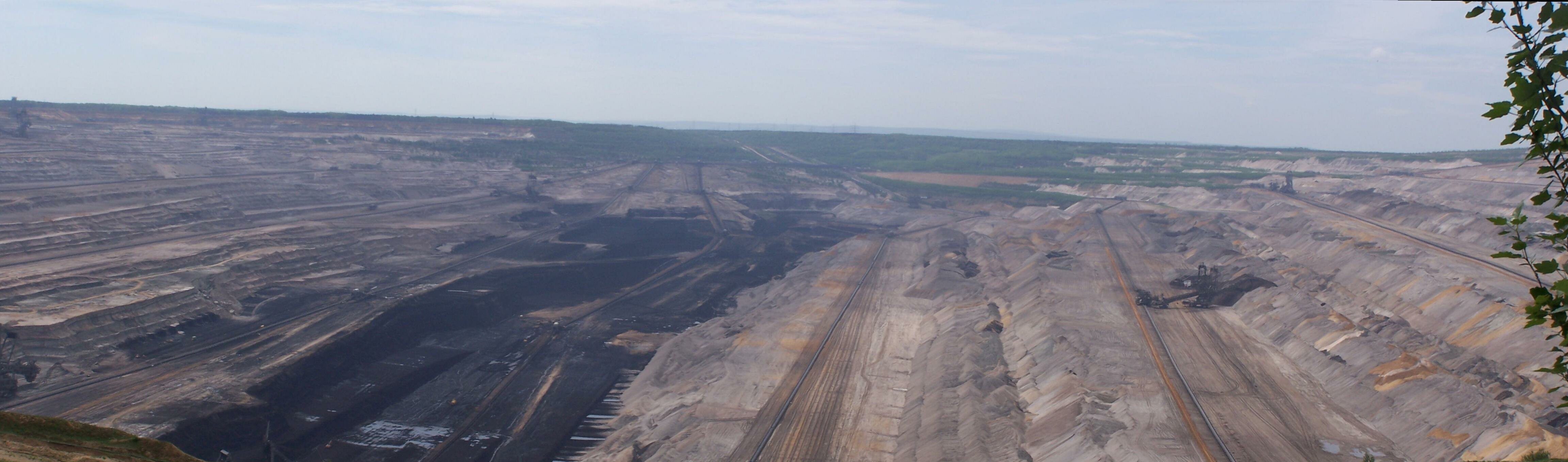 Panorama over een bruinkoolgroeve in Duitsland vlakbij Titz. Links van het midden de donkergekleurde bruinkool, rechts van het midden een graafmachine. Deze is ongeveer 30 - 40 meter hoog. Eigen werk, mei 2005